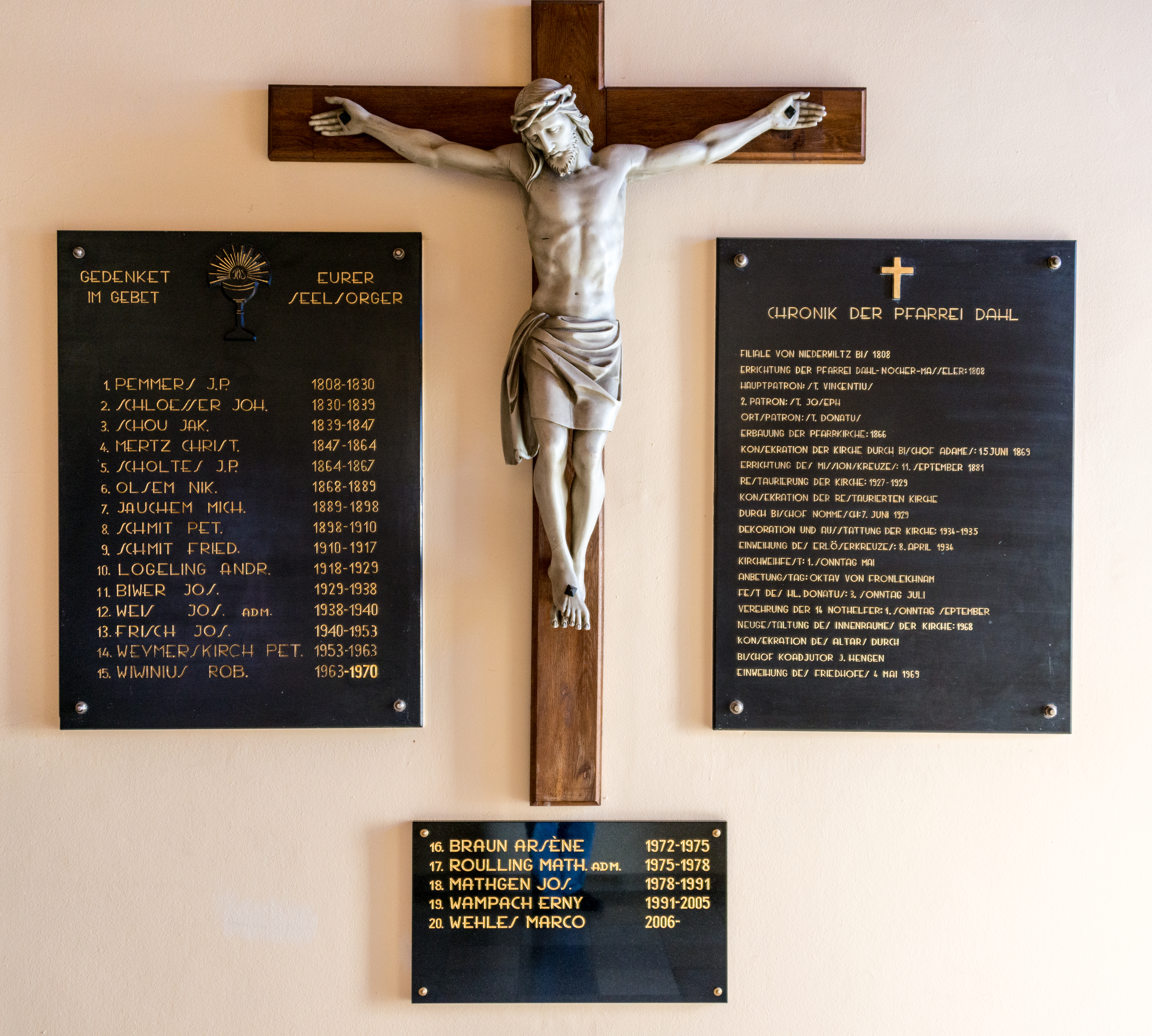 Series Pastorum an der Kierch zu Dol.